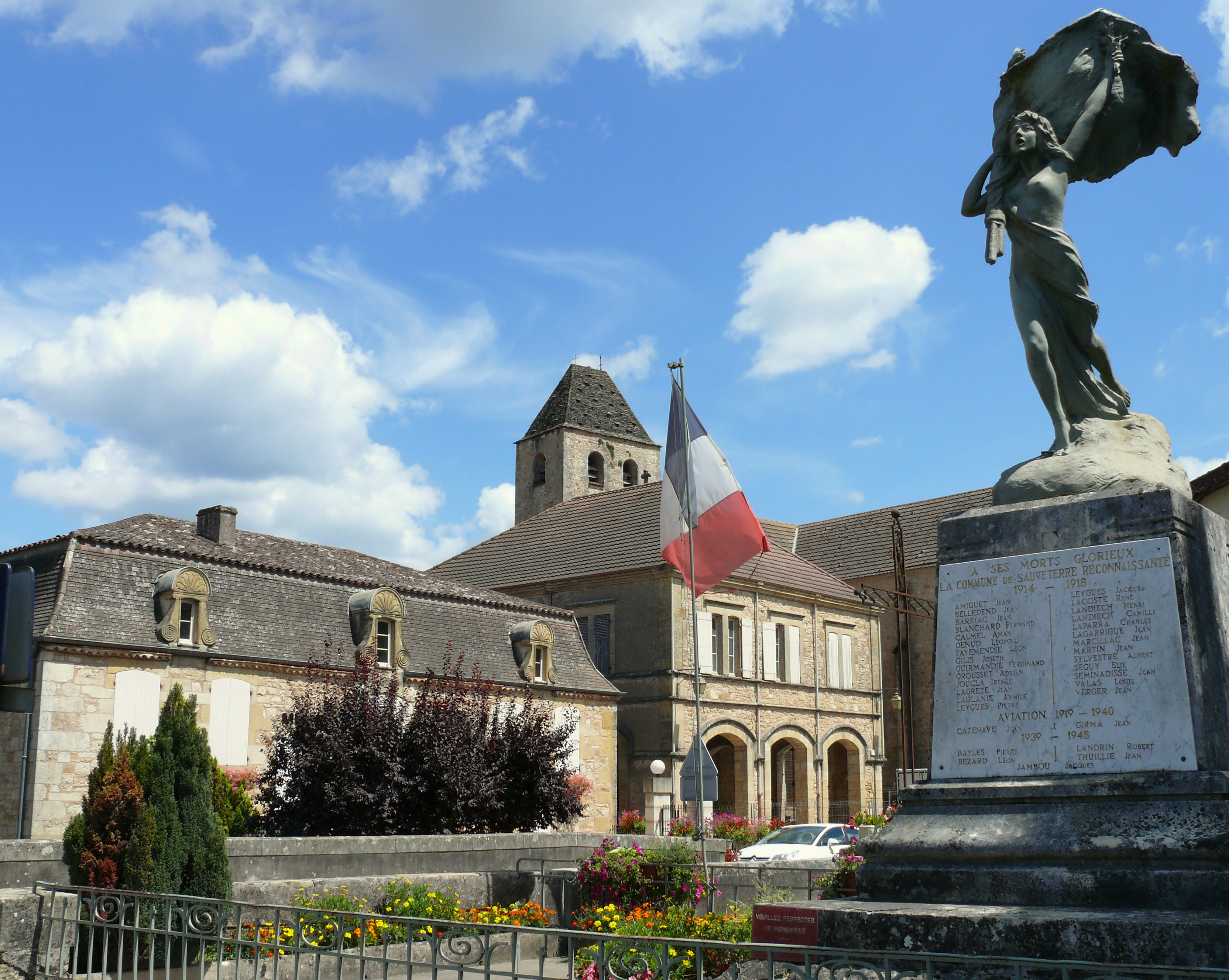 Sauveterre-la-Lémance - Monument aux morts, mairie, musée de Préhistoire, église